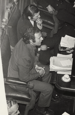 05-07-1972 Sesión ordinaria de parlamentarios; en la fotografía Jorge Lavandero.